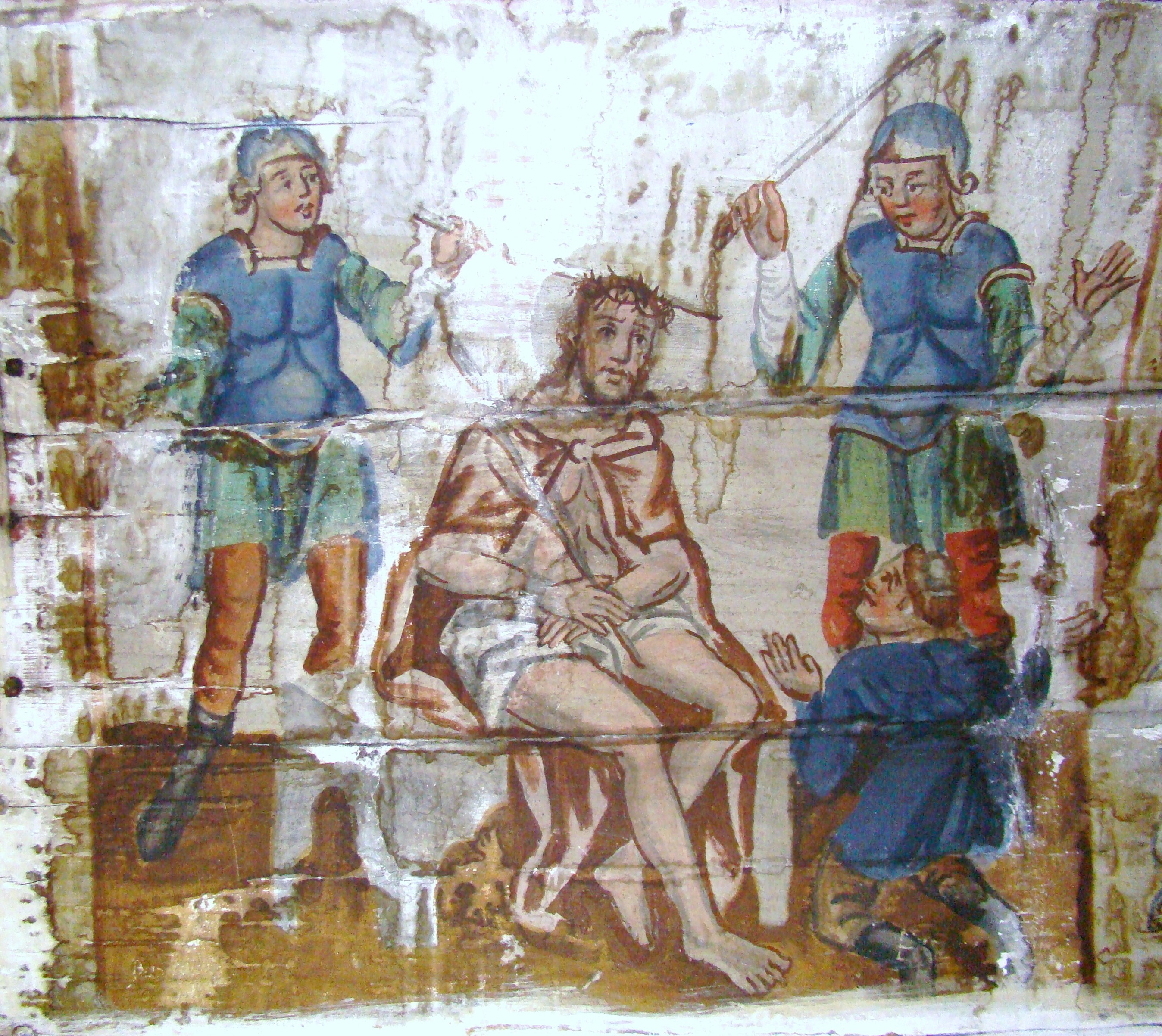 Biserica de lemn "Sfinții Arhangheli Mihail şi Gavril", sat PLOPIŞ; comuna ŞIŞEŞTI